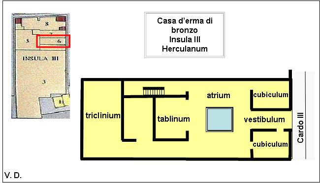 Pianta della case dell'erma di bronzo - Insula III - Ercolano